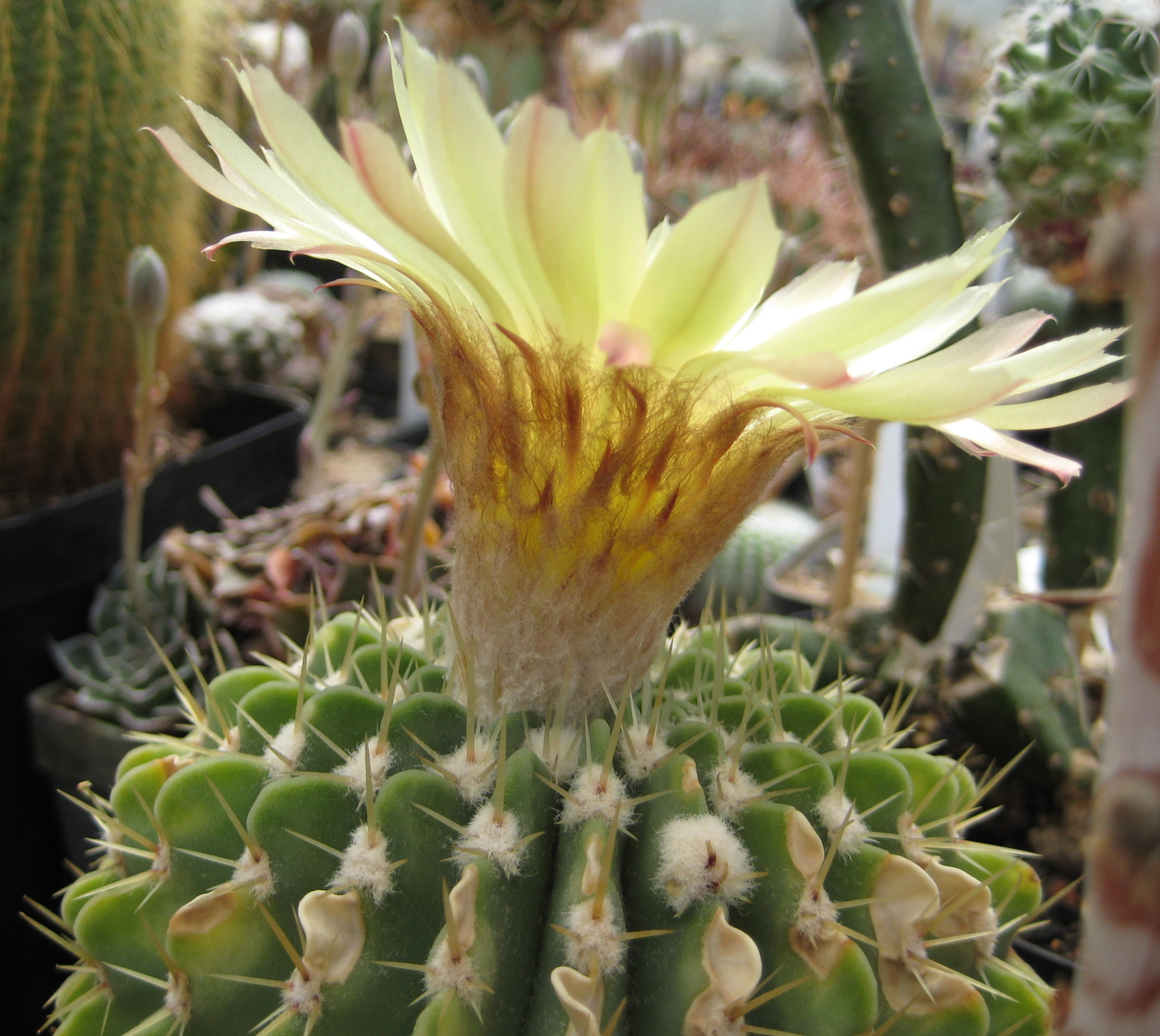 Parodia buiningii in Kultur